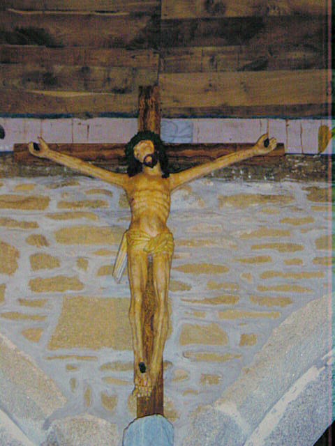 Crist de l'església de Trémalo, a Pont-Aven, pintat per Gauguin al Crist groc